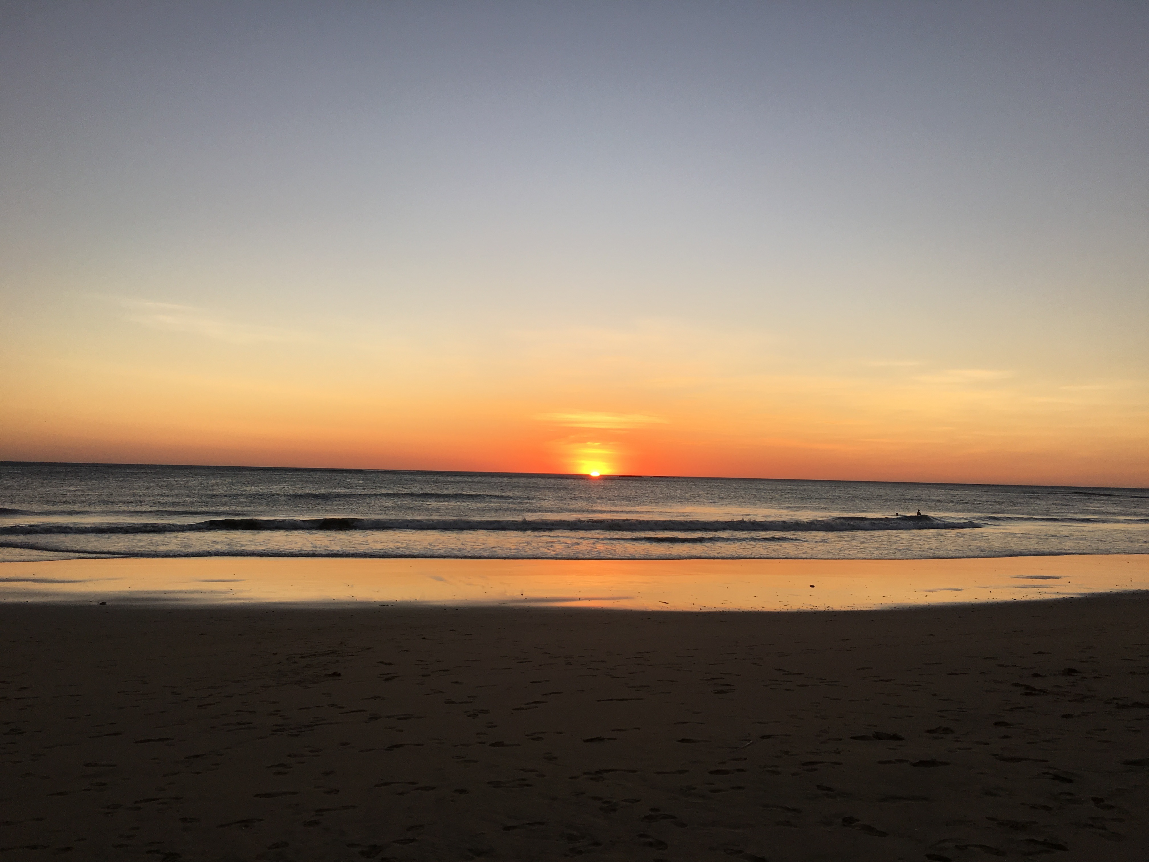 Atardecer en Playa Grande, Parque Marino Las Baulas, Costa Rica